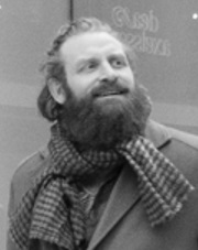 norwegian actor Kristofer Hivju